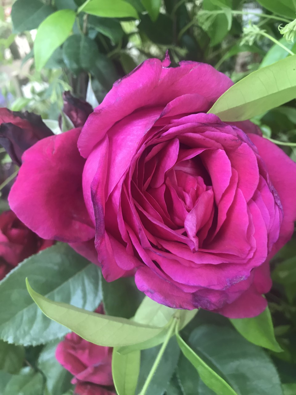 Rose 'Charlotte Rampling' au marché aux fleurs de Paris.